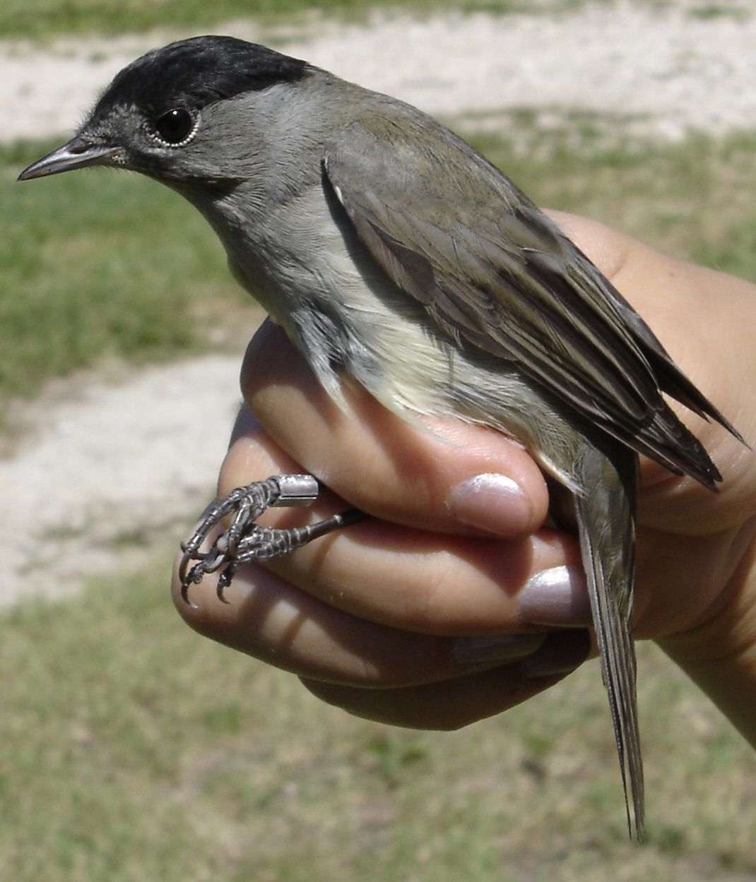 זכר צעיר. Piemontèis: Un mas-cc giovo.